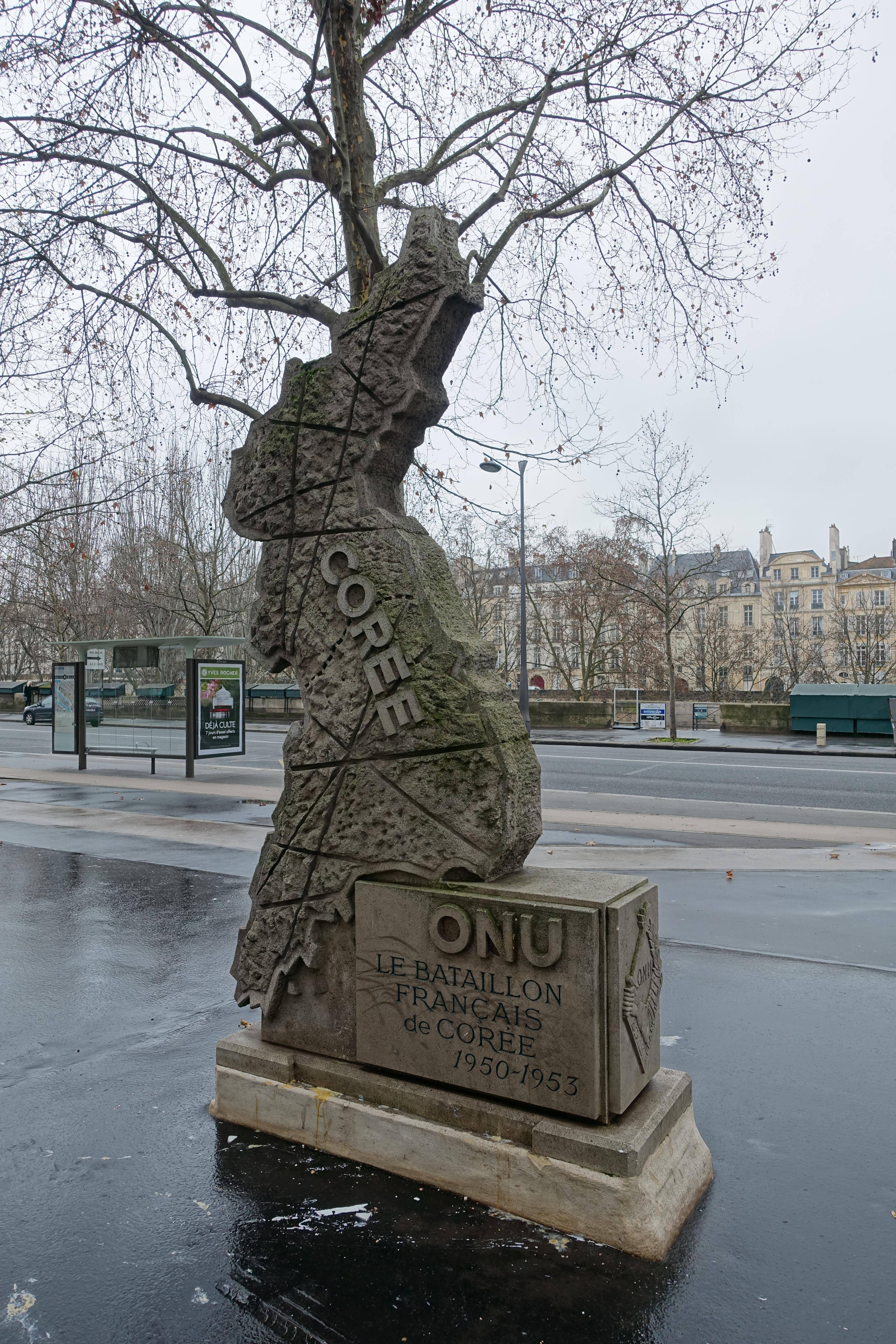 War of Korea monument, Place du Bataillon-Français-de-l'ONU-en-Corée, Paris, France.